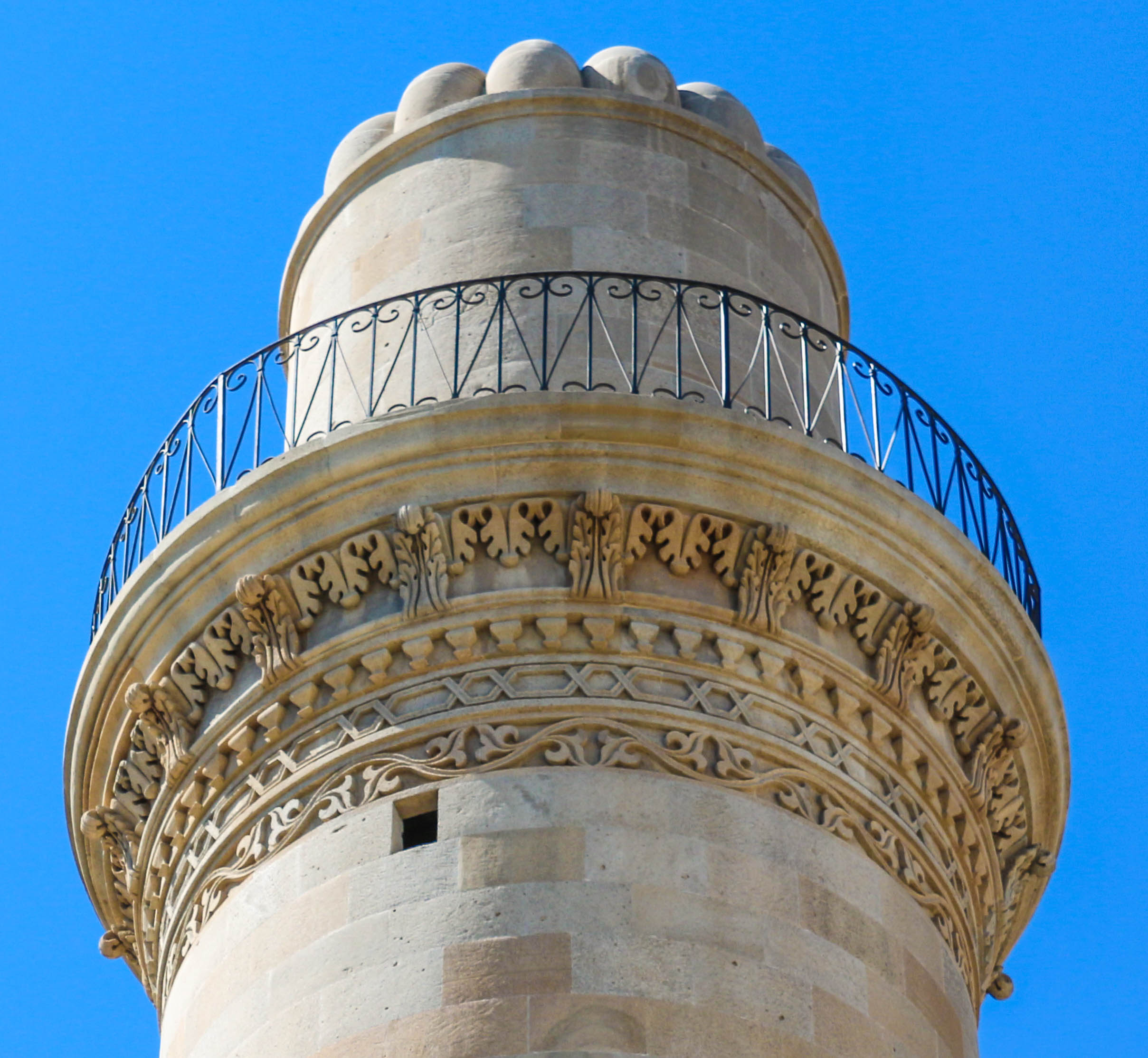 Bəylər məscidinin minarəsi detal